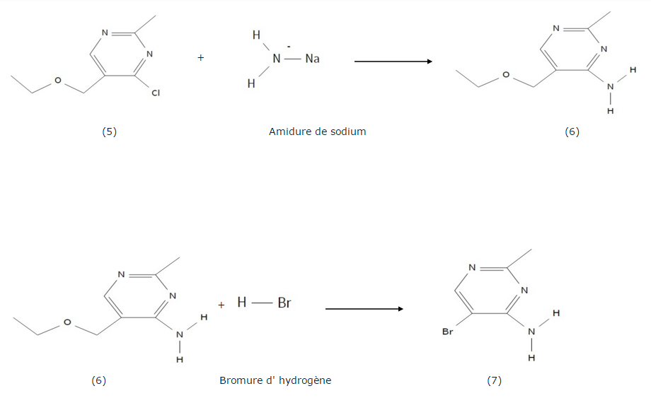 Suite de la synthèse